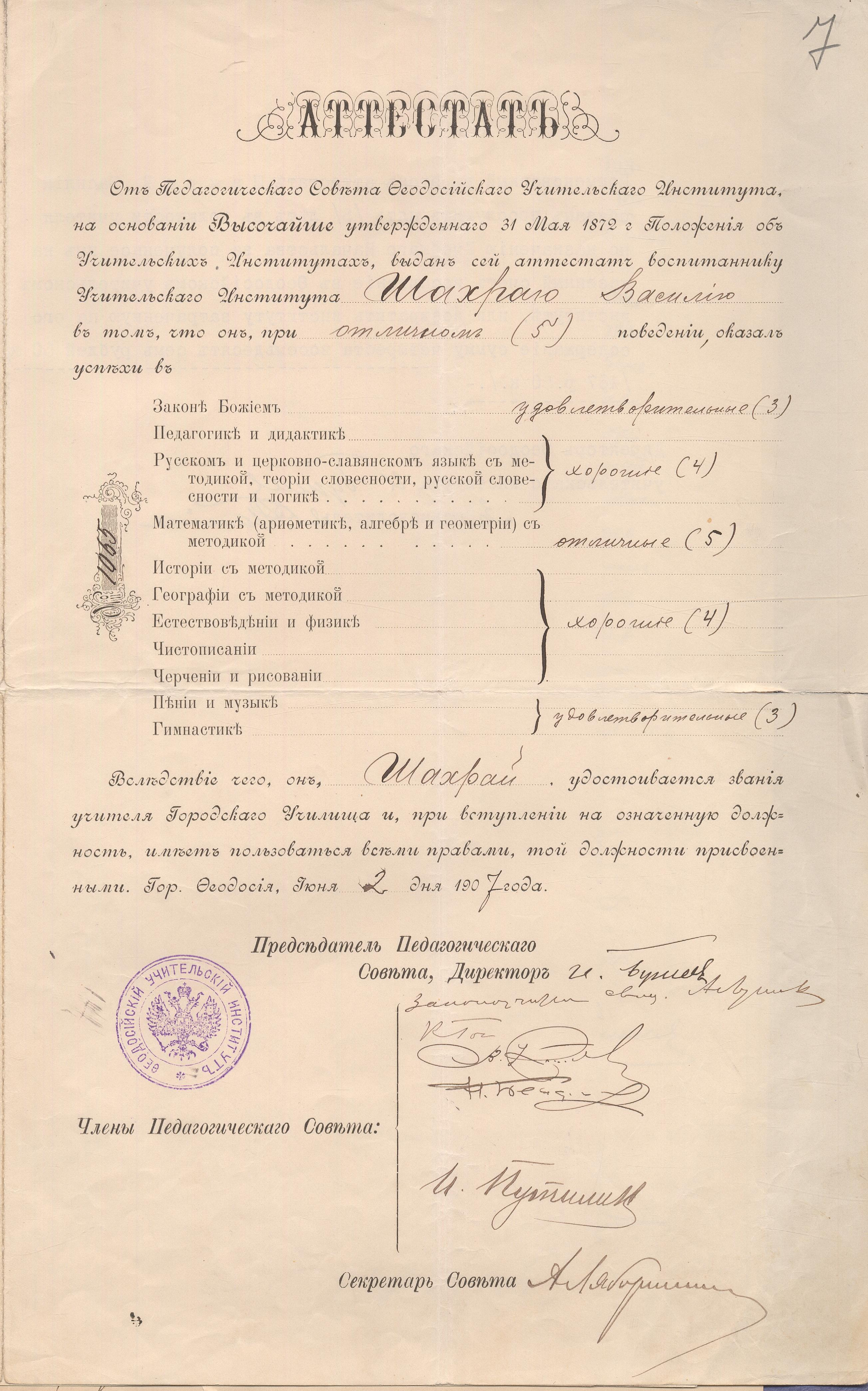 скан документу із ЦДІА у Санкт-Петербурзі